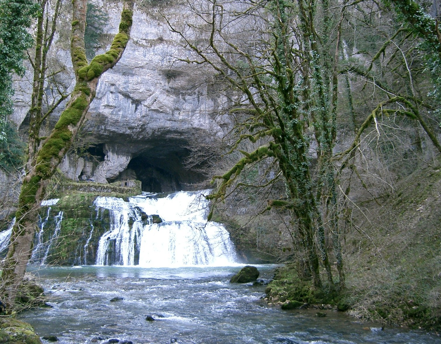 résurgence du Lison - massif du Jura (département 39 - France)